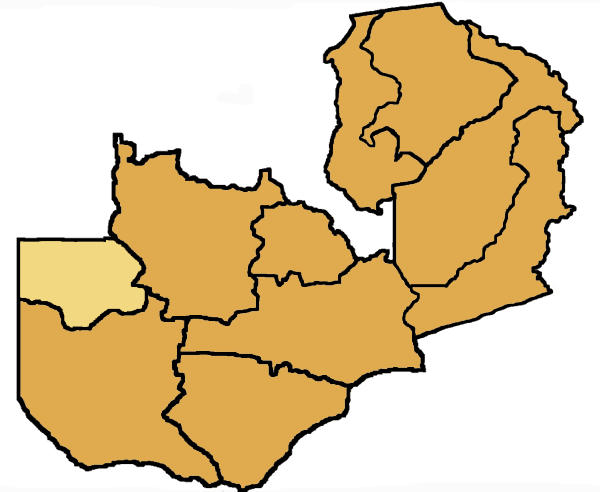 Mappa della diocesi di Mongu, in Zambia. Lavoro personale, eseguito a partire da questa immagine di Commons. Fonte per i confini: Guida delle missioni cattoliche 2005, a cura della Congregatio pro gentium evangelizatione, Roma, Urbaniana University Press, 2005. Categoria:Chiesa cattolica in Zambia Categoria:Mappe dell'Africa